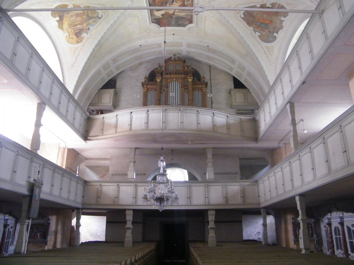 Kostel Navštívení Panny Marie v Lobendavě, empora s varhanami